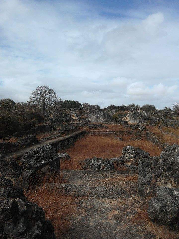 Ruines de la salle d'audience du tribunal du sultan de Kilwa, palais Husuni Mkubwa, Kilwa Kisiwani, Tanzanie 2016